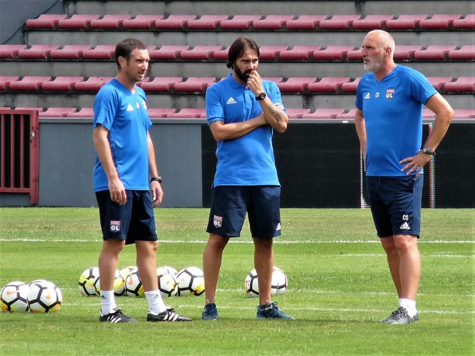 Reynald Pedros et son staff lors de la préparation d'avant saison en août 2017 à Toulouse. Charles Devineau - Christophe Gardié.